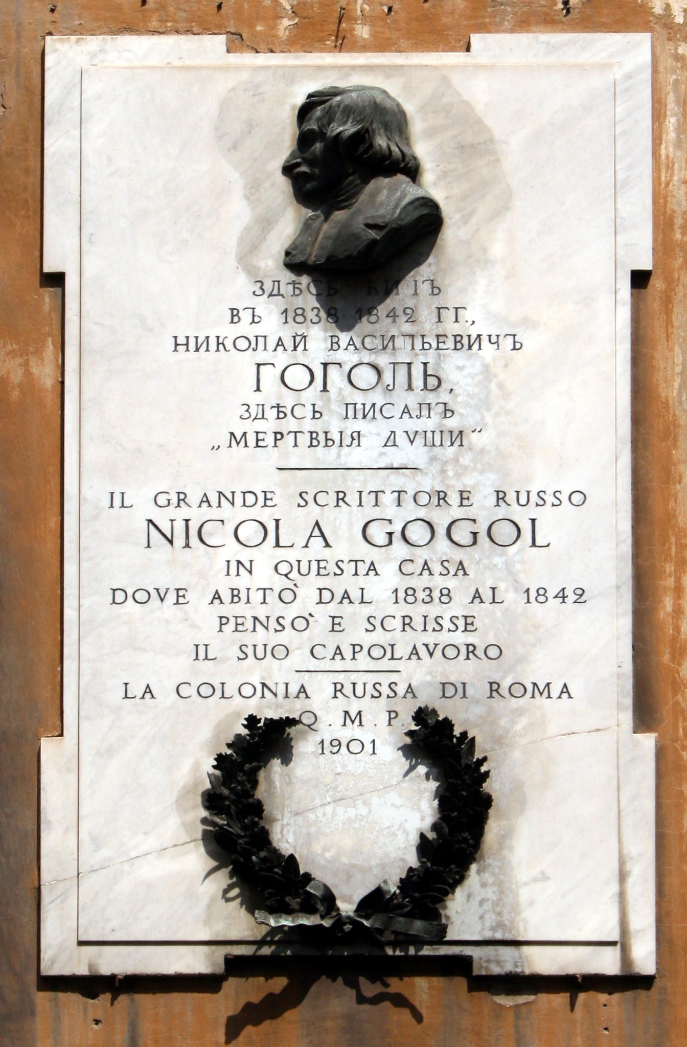 Plaque celebrant la vie de Nicolas Gogol à Rome en 1838-1842, in via Sistina 126.